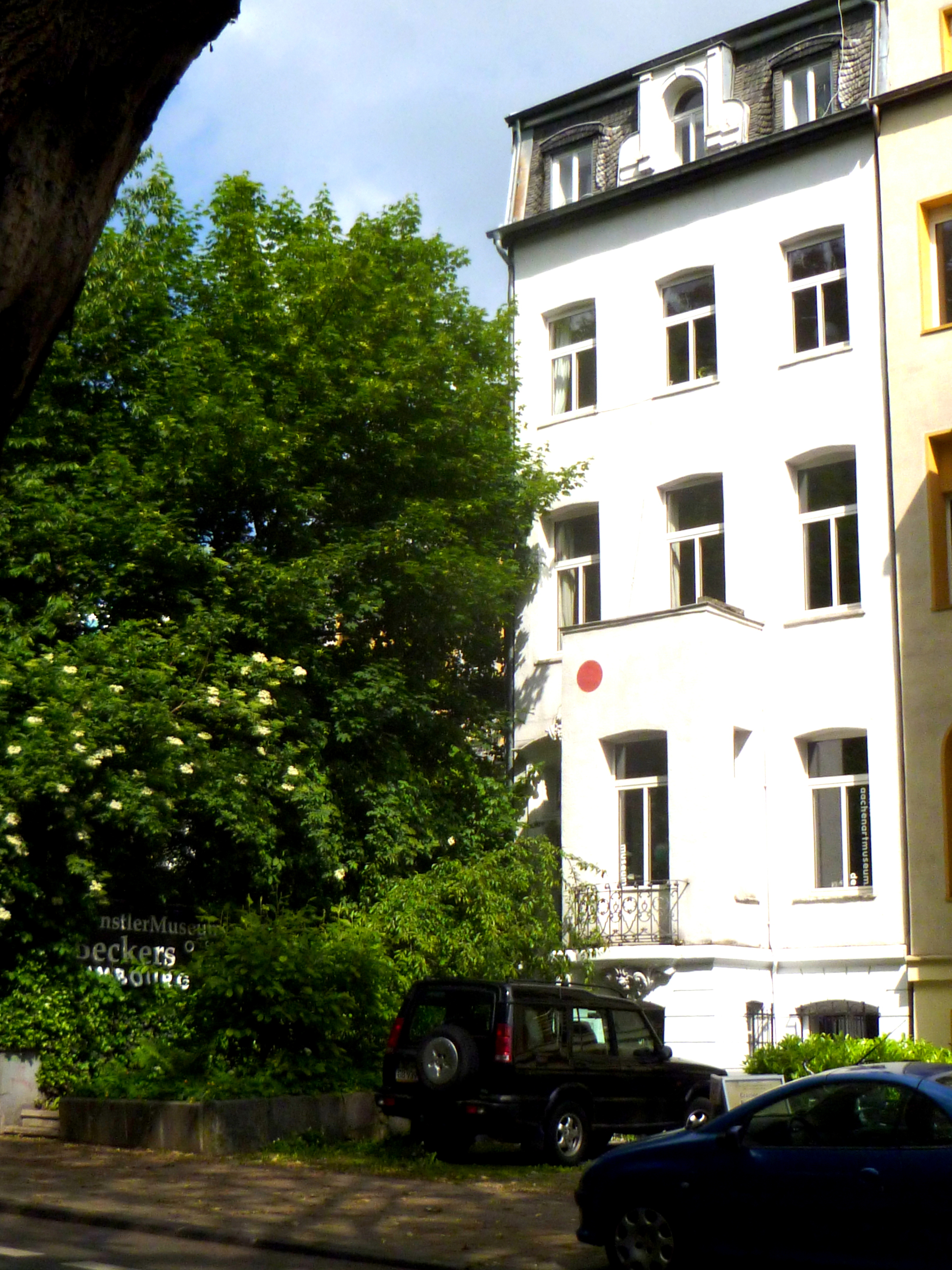 Museumstrakt Beckers-Böll in Aachen